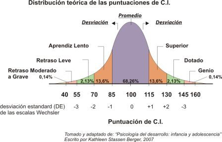 Curva de medición y distribución del CI